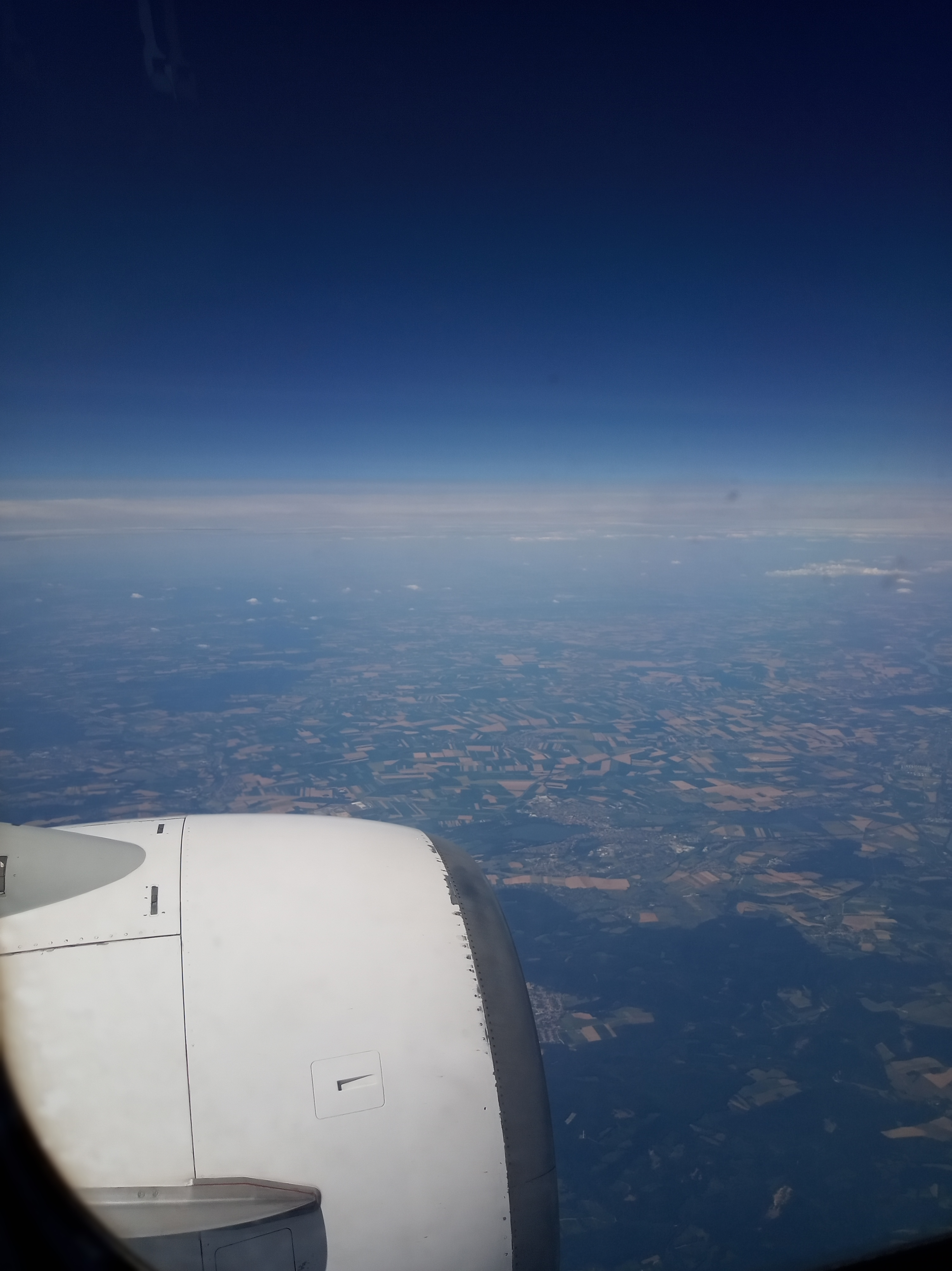 Letecký snímek Rakouska, focený z okýnka dopravního letadla